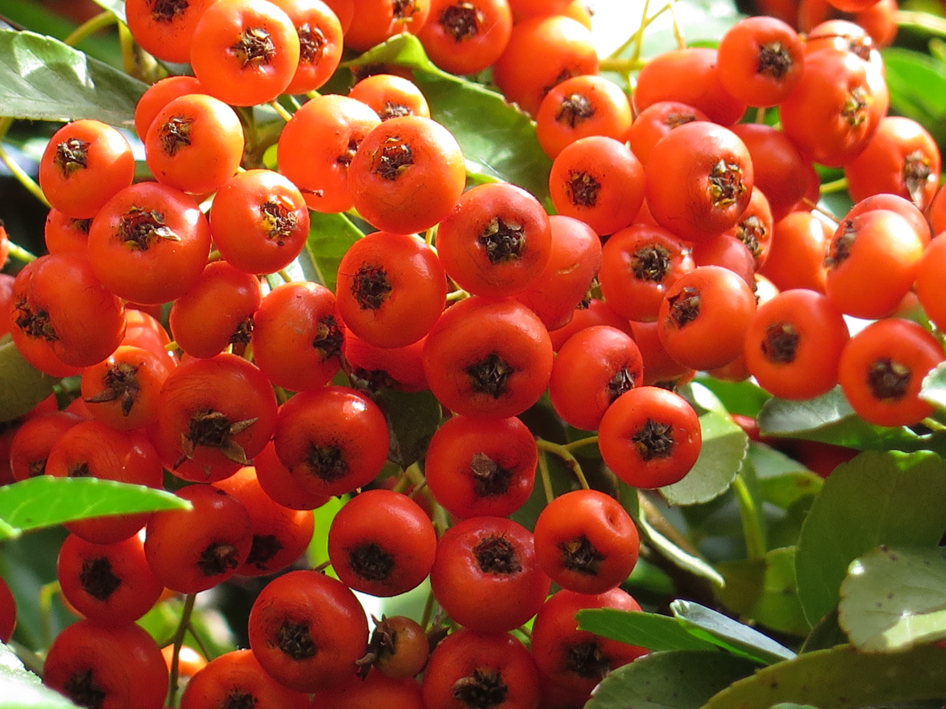 La pyracantha coccinea in autunno